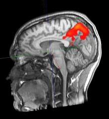 Bildbeschreibung: Dieses Bild zeigt eine fMRT Aufnahmen des Gehirns eines 24-jährigen Probanden. Quelle: Screenshot Fotograf/Zeichner: Martin Witte Datum: 13.06.2005